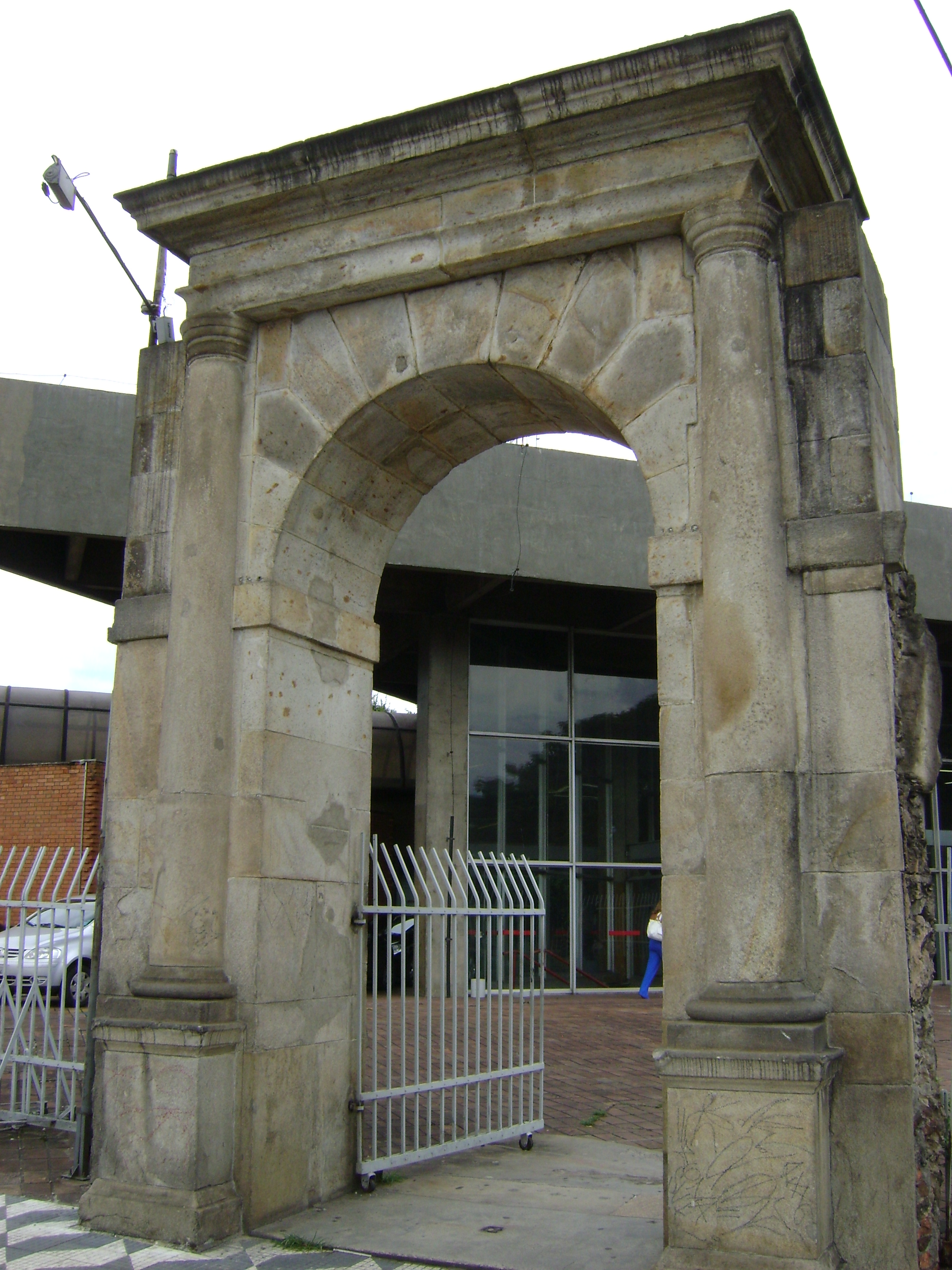 Portal do já demolido Presídio Tiradentes, em São Paulo, que abrigou os presos políticos do Estado Novo e da ditadura militar